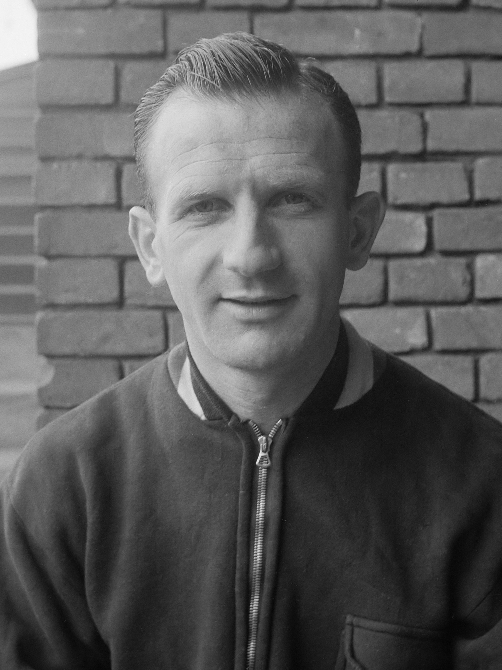 Training Nederlands elftal voor de wedstrijd Nederland tegen Oostenrijk. Kees Rijvers 24 september 1957